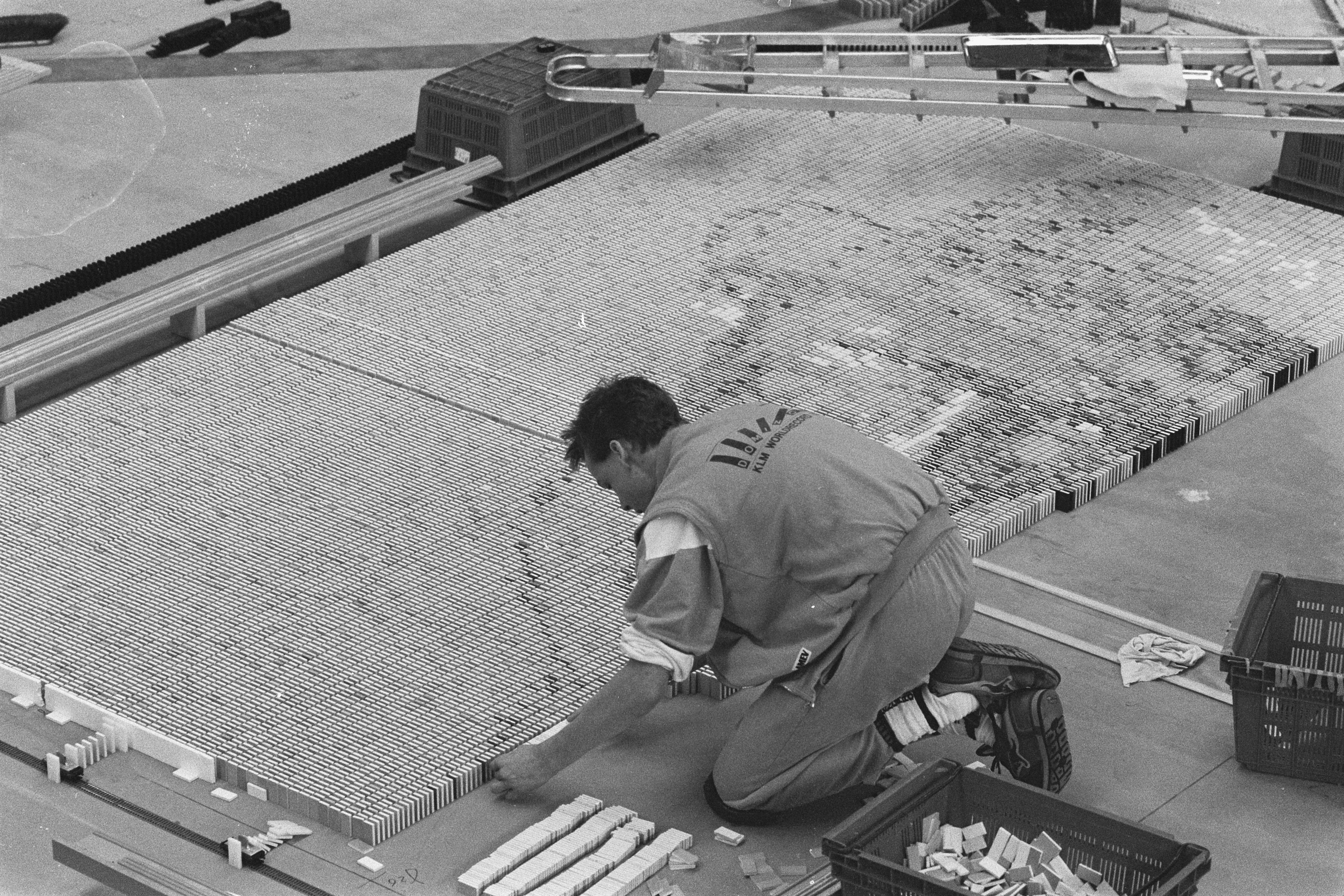 Collectie / Archief : Fotocollectie Anefo Reportage / Serie : [ onbekend ] Beschrijving : Wereldrecordpoging dominostenen omgooien in Lisse; medewerker bezig met zelfportret Van Gogh Datum : 16 december 1986 Locatie : Lisse Trefwoorden : wereldrecords Fotograaf : Bogaerts, Rob / Anefo Auteursrechthebbende : Nationaal Archief Materiaalsoort : Negatief (zwart/wit) Nummer archiefinventaris : bekijk toegang 2.24.01.05 Bestanddeelnummer : 933-8417